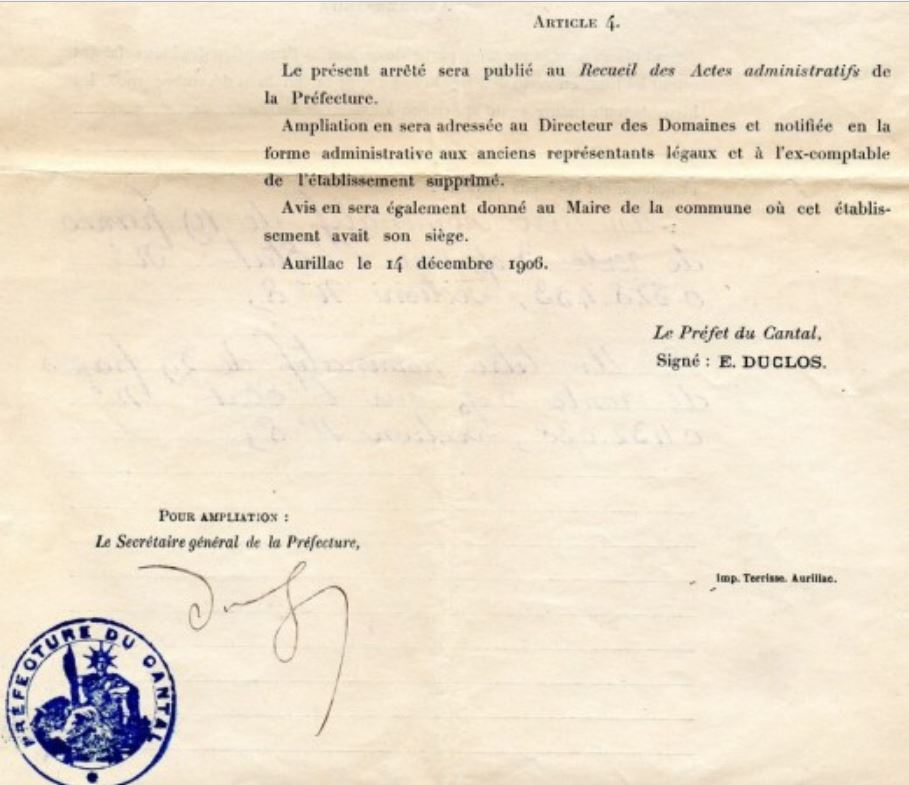 gros plan ampliation arrêté préfectoral